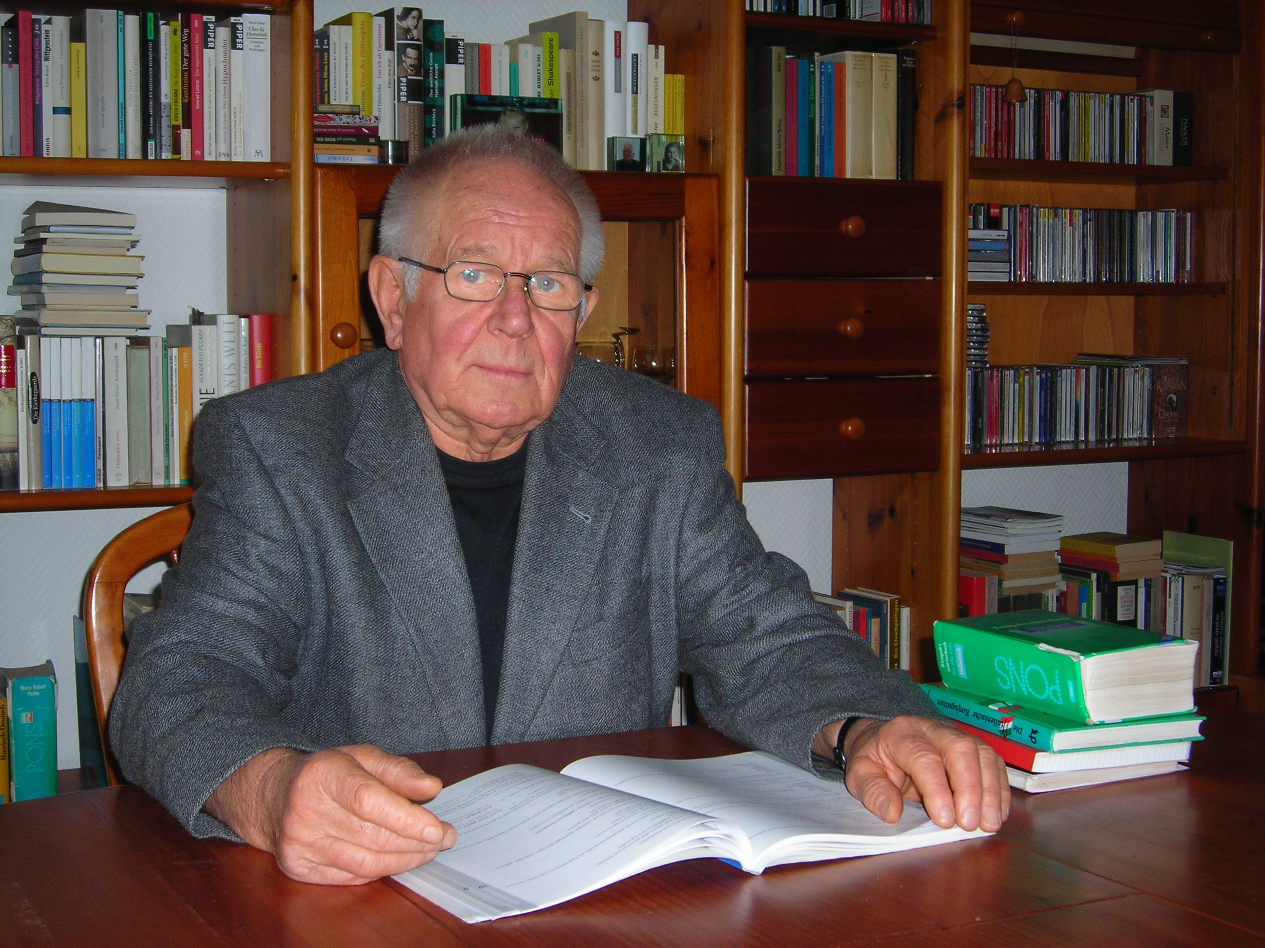 Norbert Makowski (*1932), deutscher Pflanzenbauwissenschaftler und Kolumnist